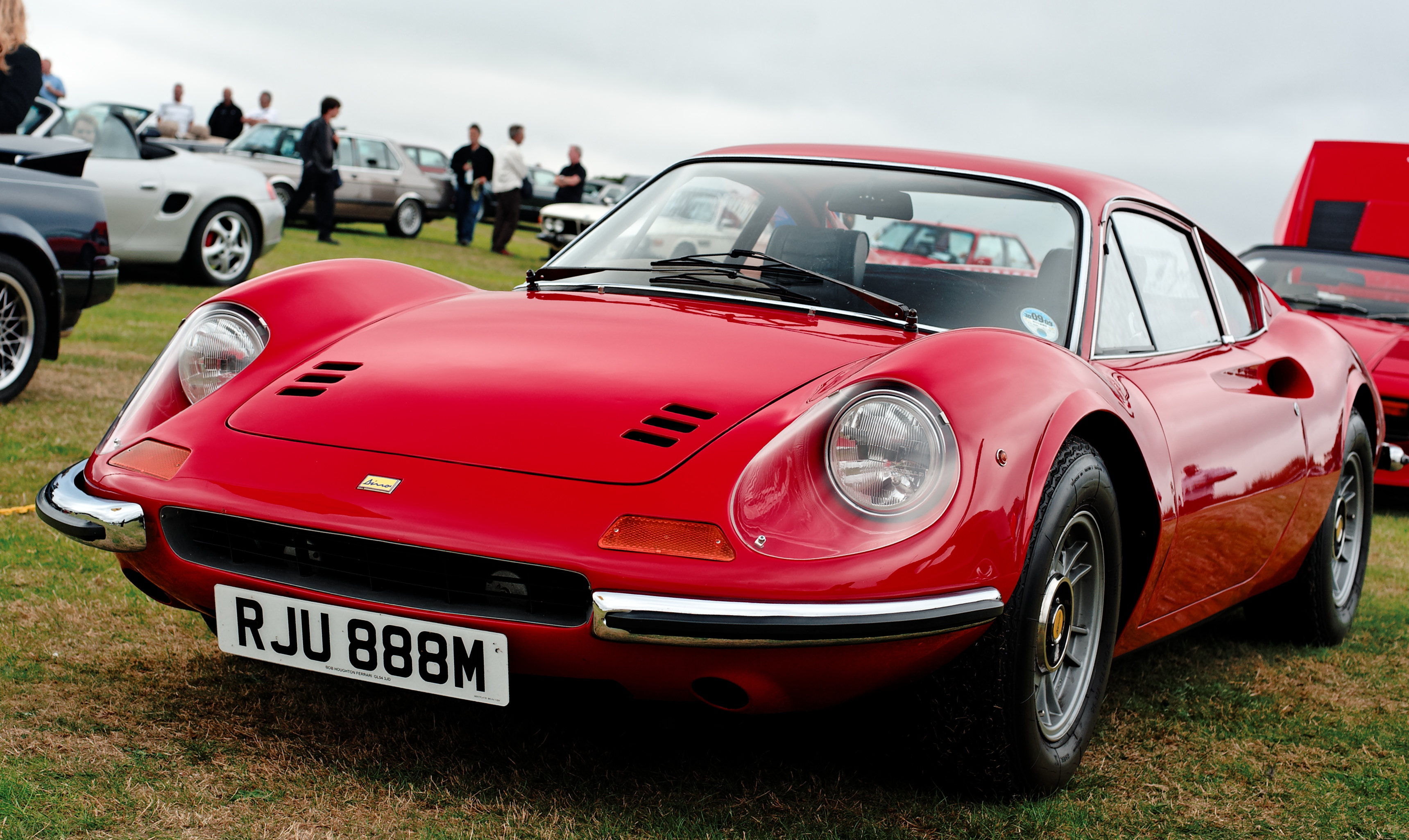 Dino 246 GT